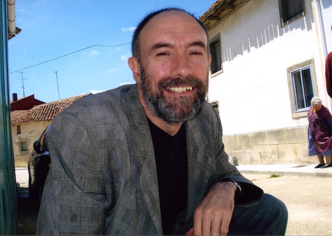 Fotografía de Eduardo Fraile Valles en Castrodeza (provincia de Valladolid, España)